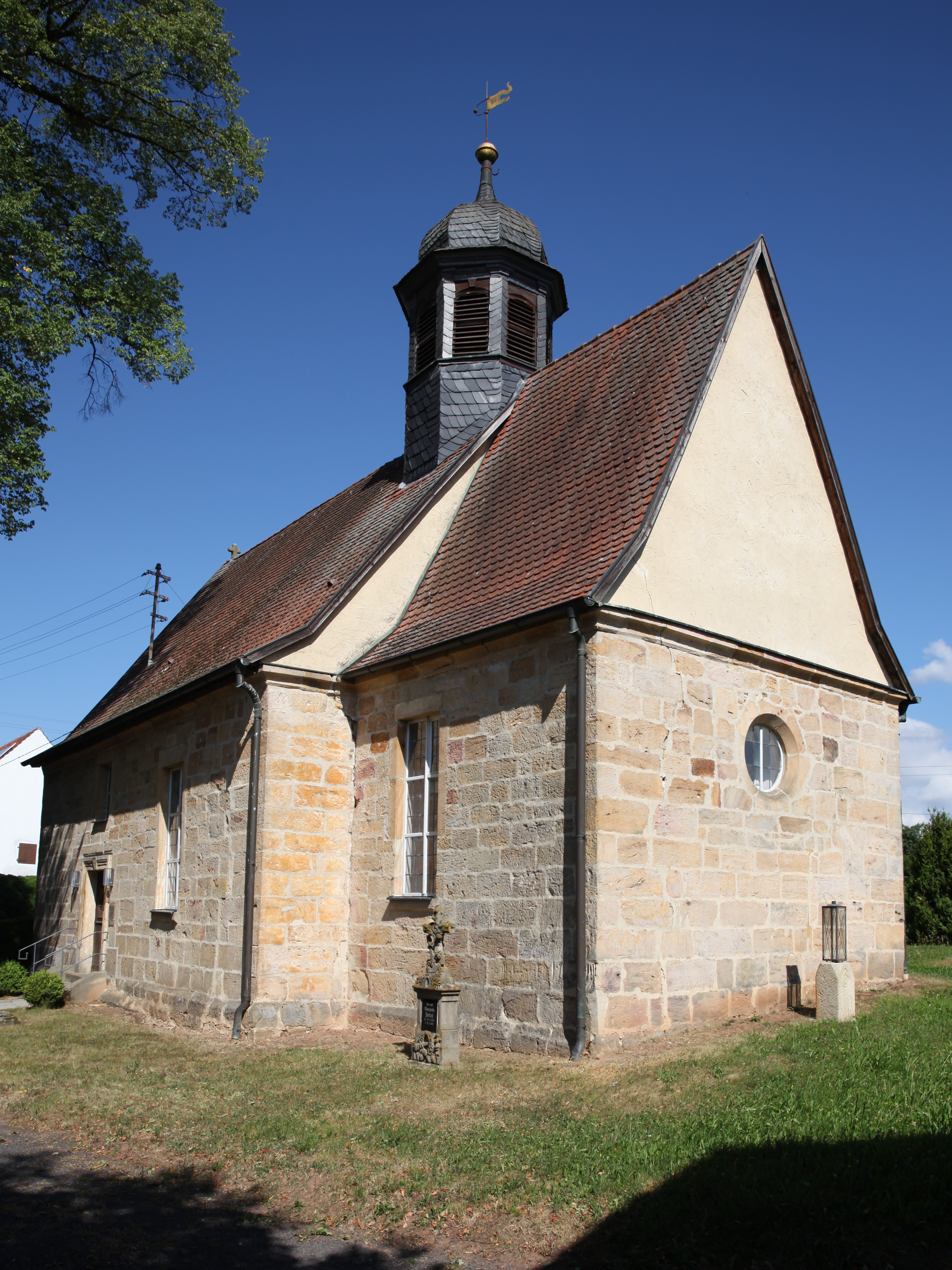 Evangelisch-lutherische Kirche in Bischwind bei Heilgersdorf